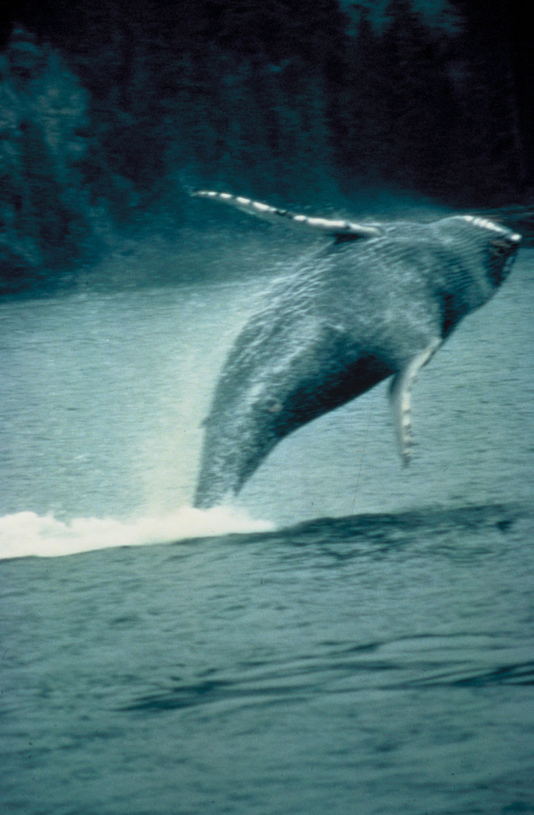 humpback whale : domaine public